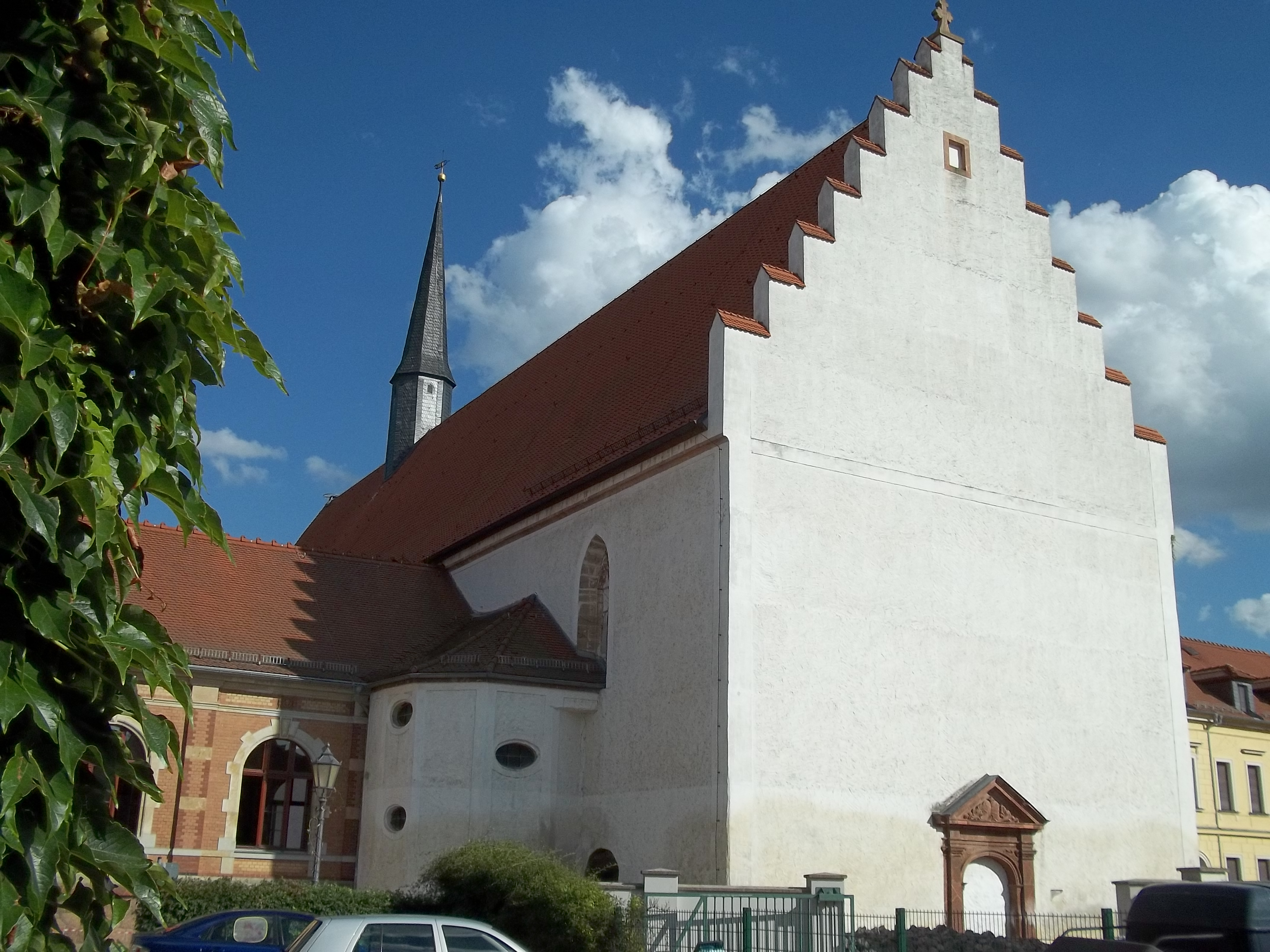 Die Klosterkirche Grimma von ihrer Nord-West-Seite - Foto: Holger Zürch